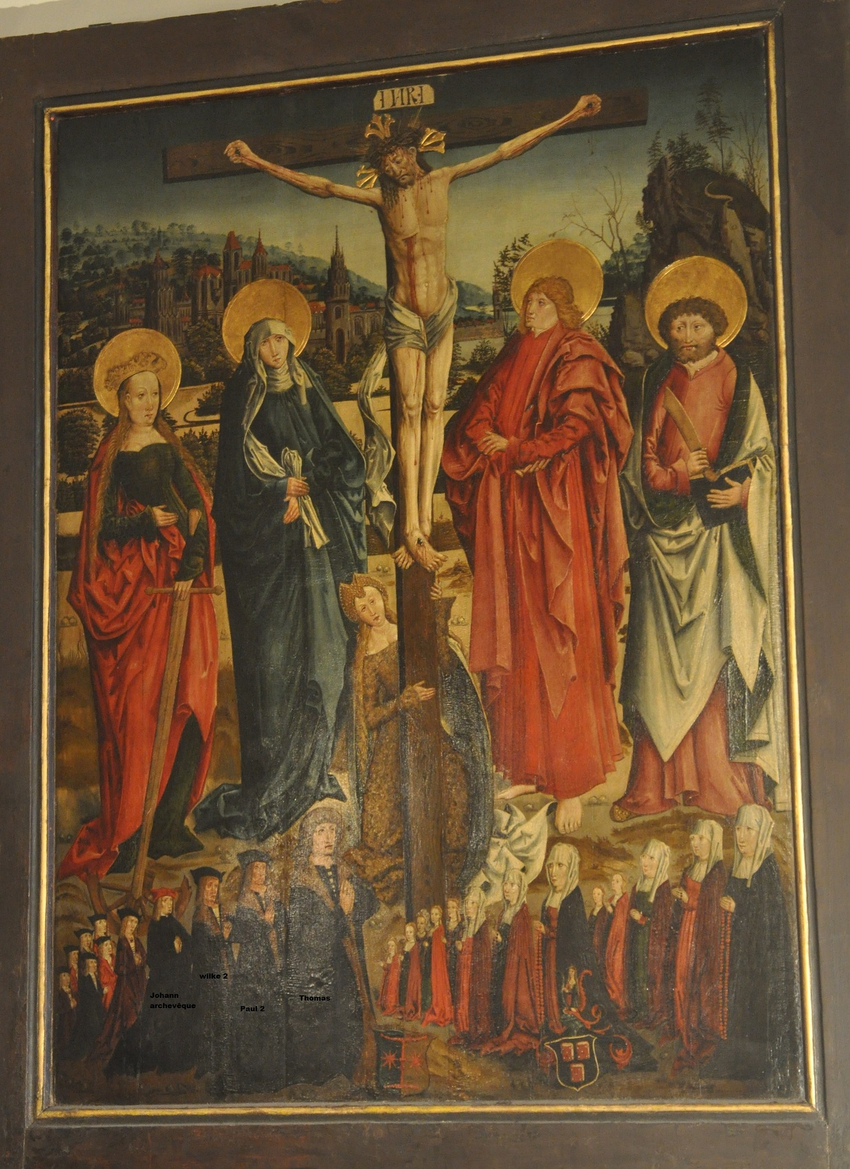 famille de thomas von Blankenfelde dans les années 1500